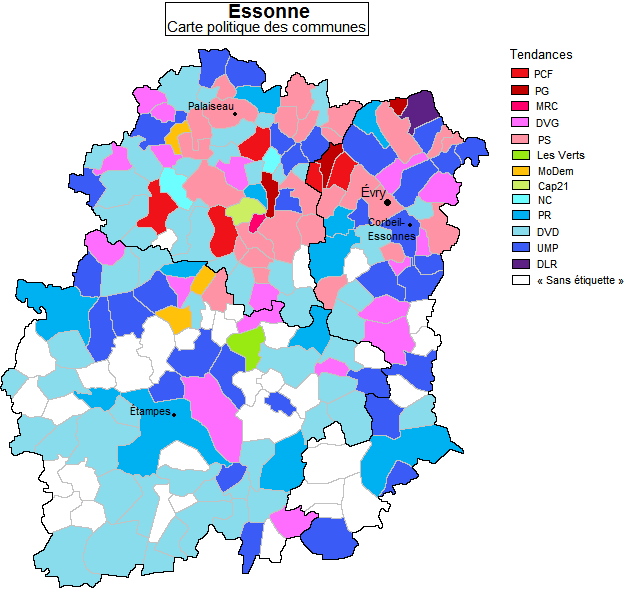 Carte politique des communes de l'Essonne (91)